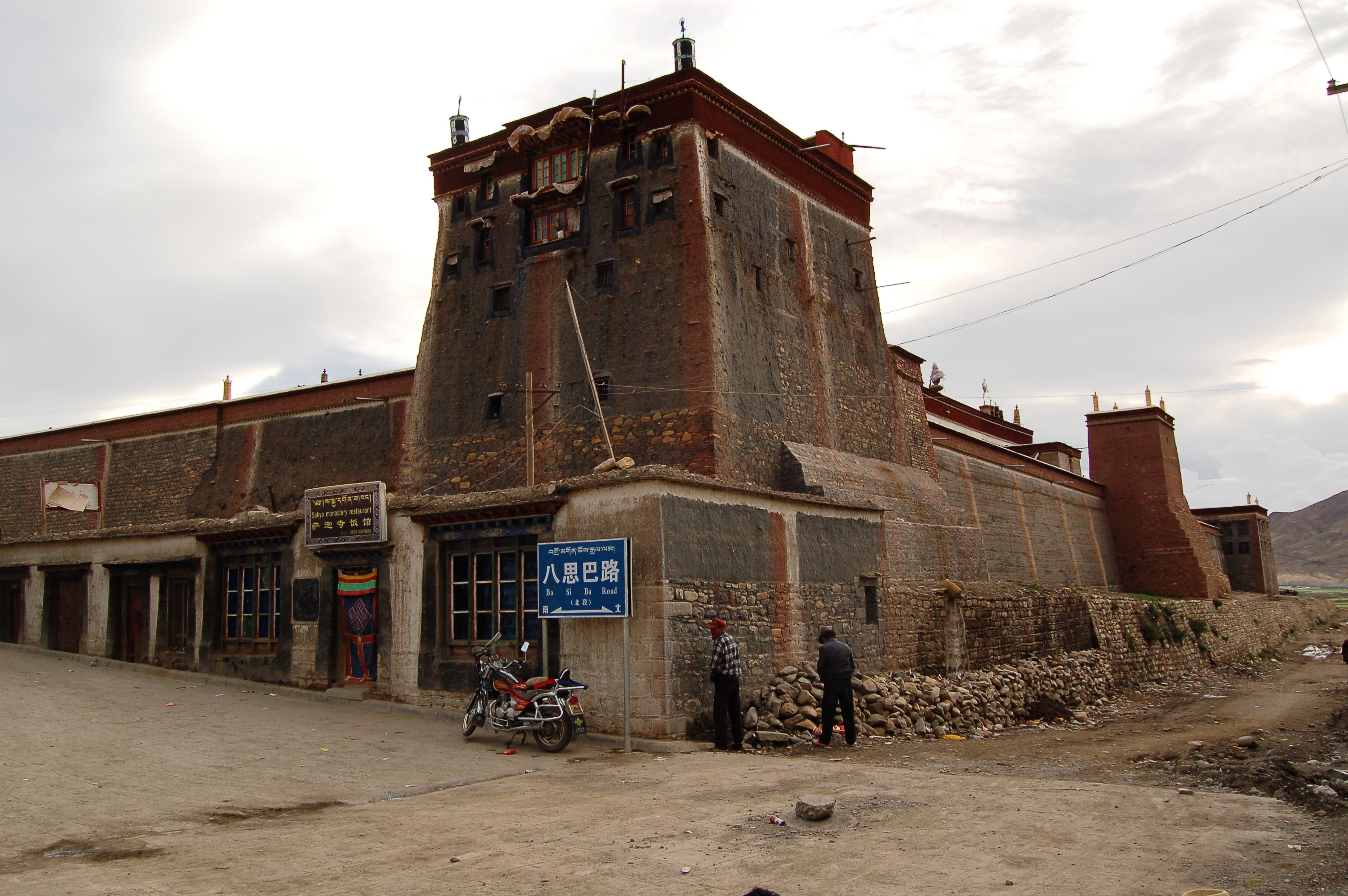 Sakya (sa-skya) Südkloster